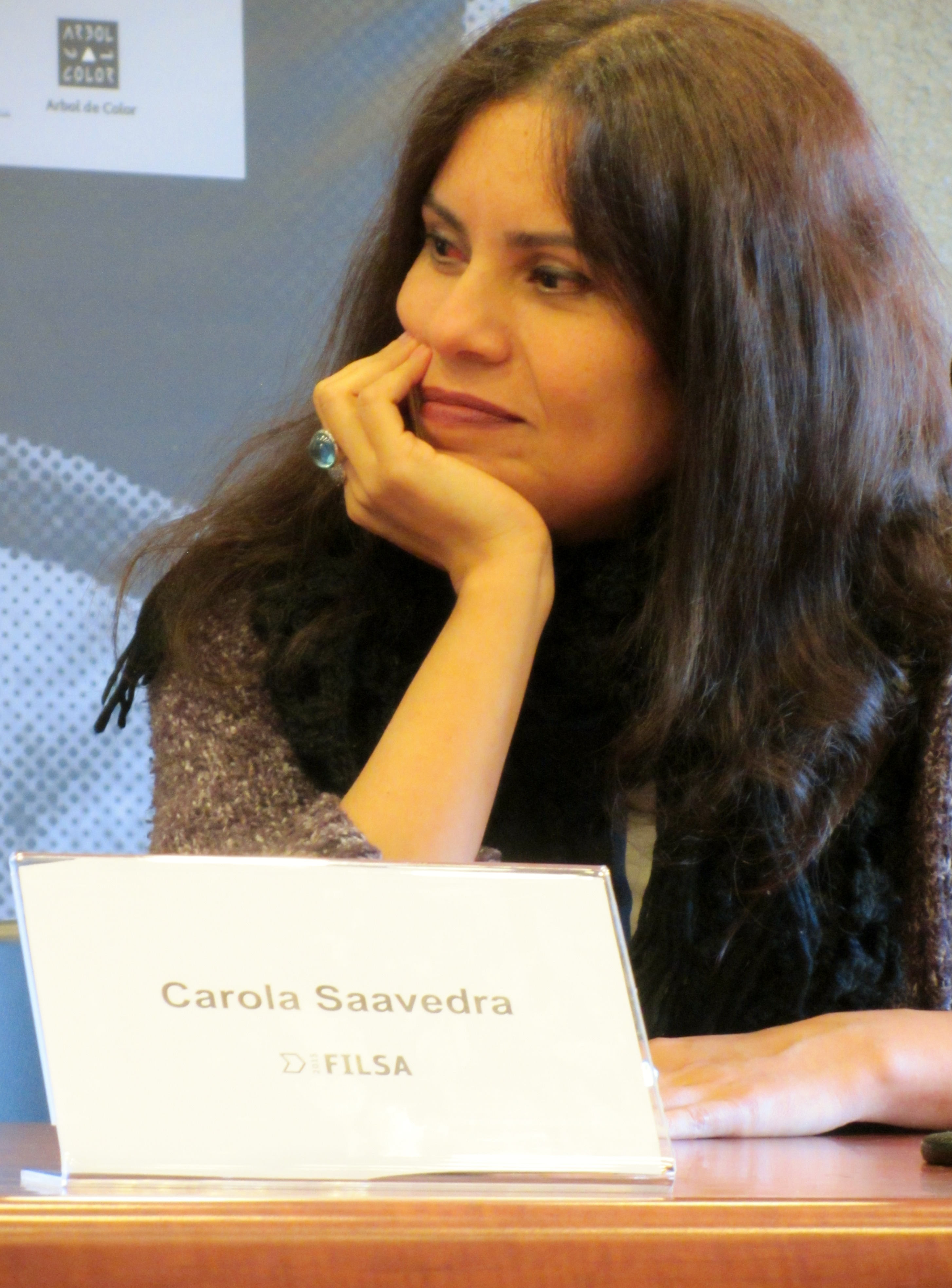 La escritora brasileña Carola Saavedra en la Feria Internacional del Libro de Santiago 2015